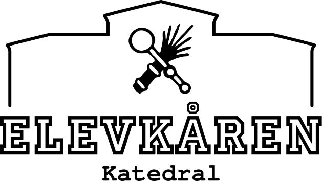 Elevkåren Katedrals logotyp